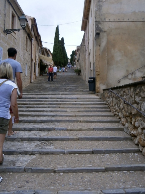 Treppe in Pollenca